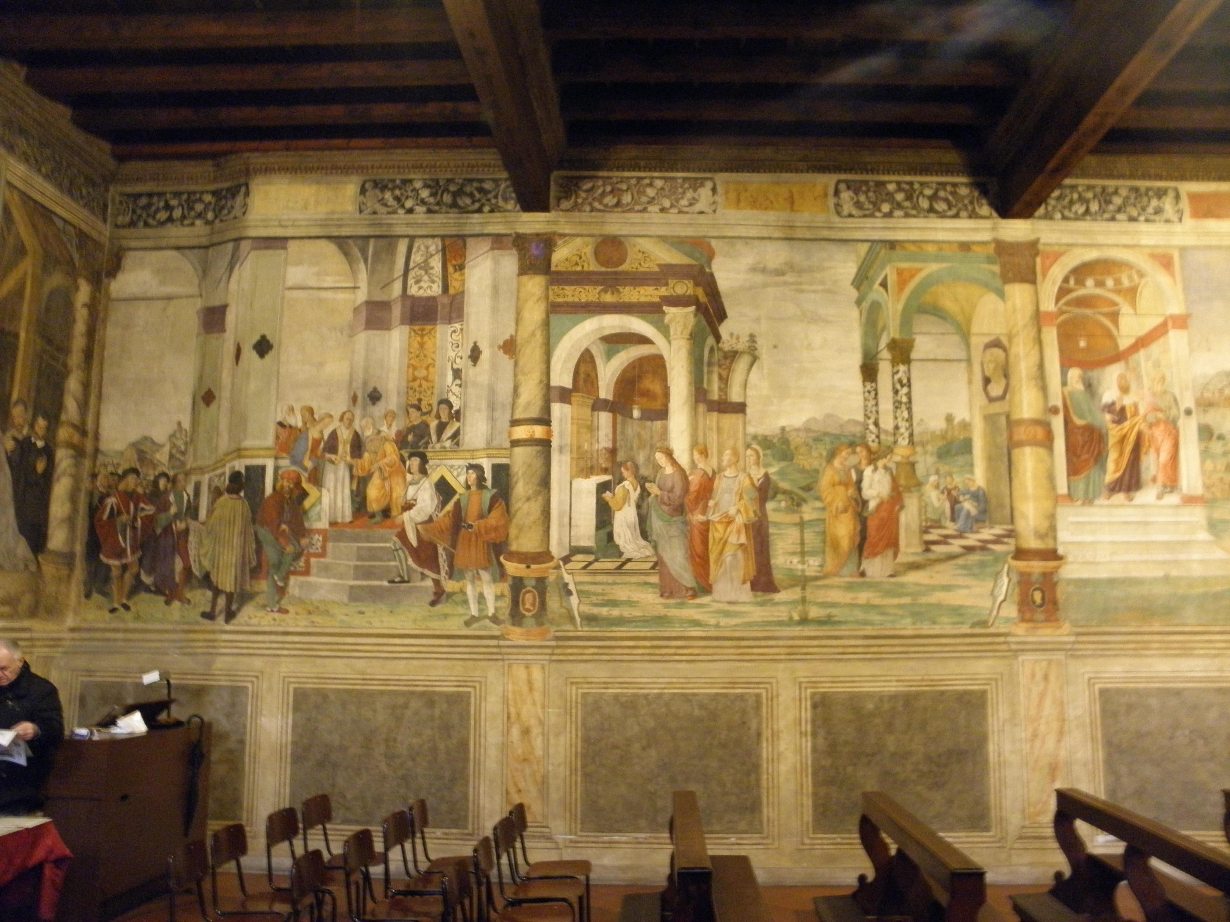 Padova, Scuola del Carmine: Ciclo della vita della Vergine Maria, a destra lo Sposalizio di Mariai di Giulio Campagnola.